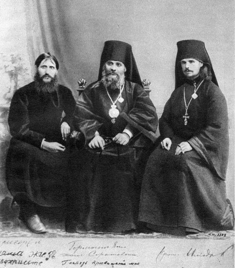 Григорий Распутин, Гермоген (Долганёв), Илиодор (Труфанов)